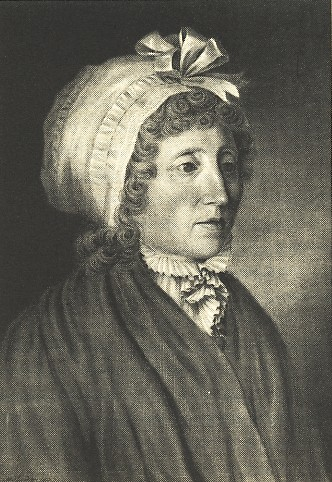 Kreidezeichnung von Maria Karoline Herder, geb. Flachsland; Ehefrau von Johann Gottfried Herder